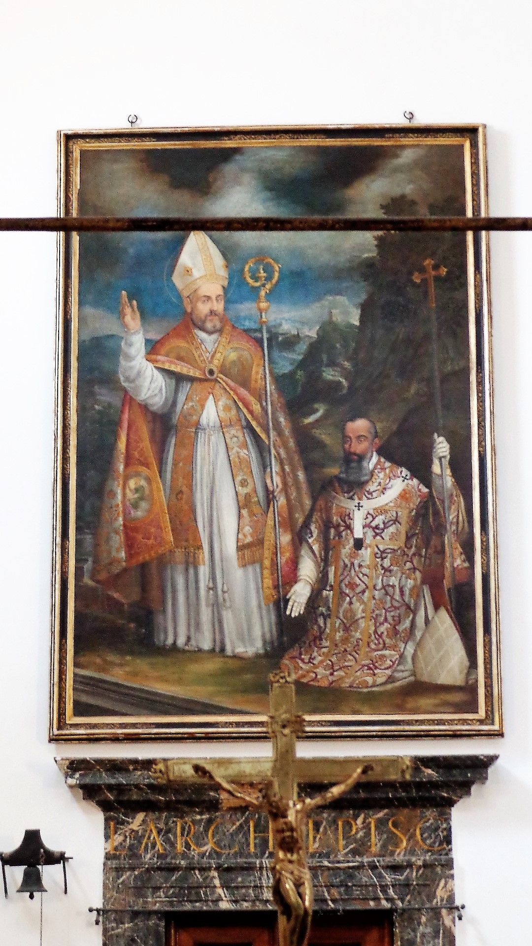 Dipinto altare maggiore cappella: San Castrense raffigurato in abiti pontificali con il vescovo Ludovico II Torres. Pietro Antonio Novelli (1568-1625).